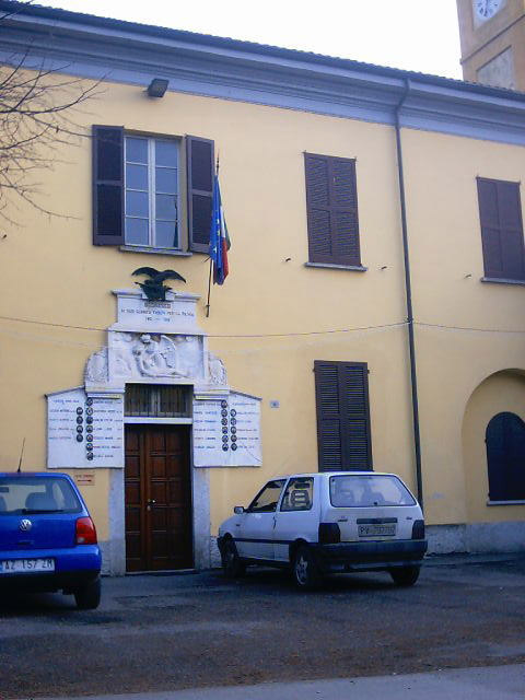 Municipio di Bosnasco, provincia di Pavia